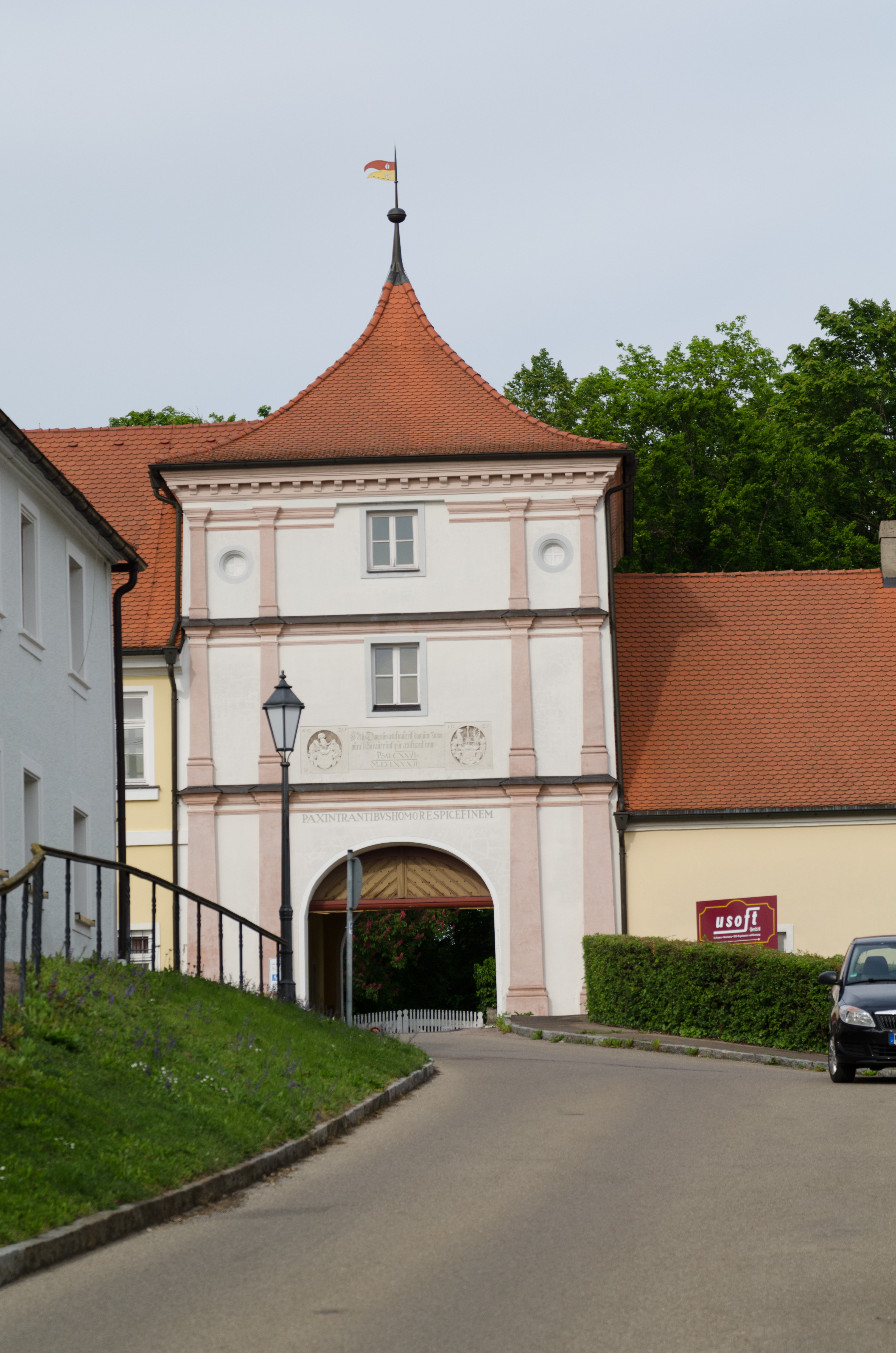 Wallerstein, Berg 78